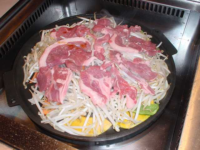 ジンギスカン鍋（火が通る前。2005年4月投稿者が撮影）